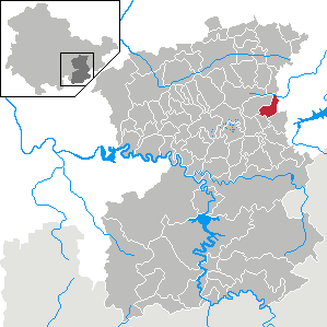 Chursdorf in Thuringia - Saale-Orla-Kreis